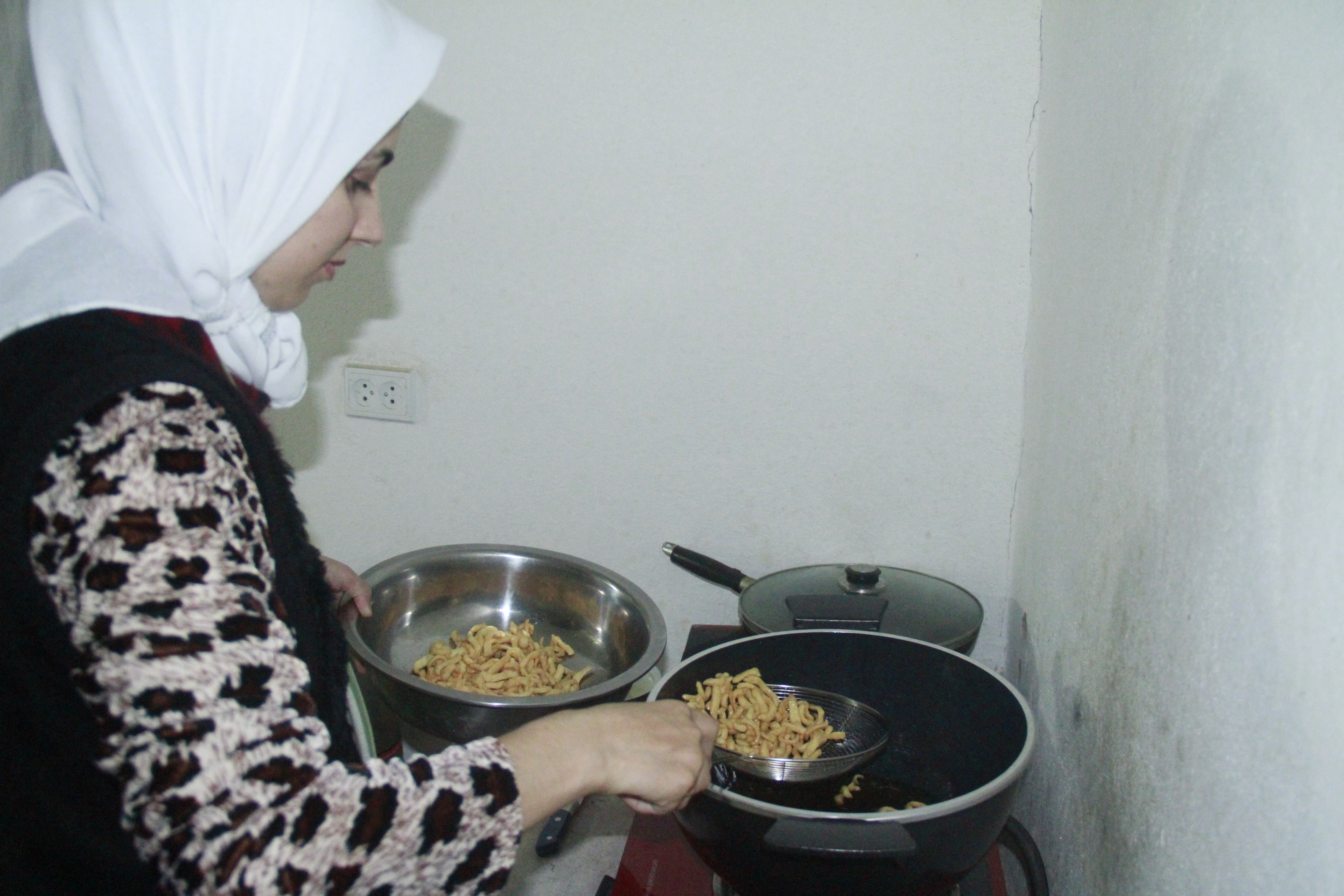 Тоҷикӣ: Чак-чак (8)